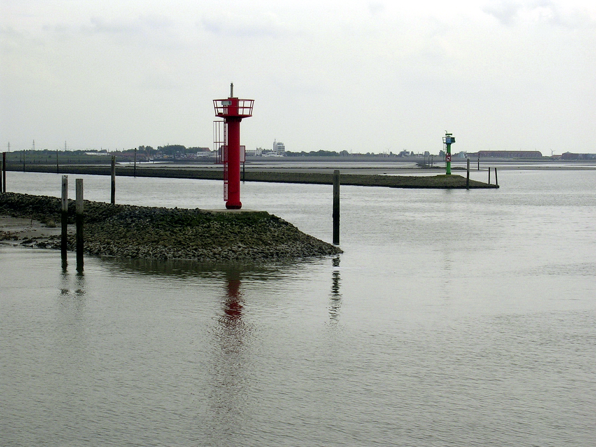 selbst fotografiert, elvaube, 02.07.2005